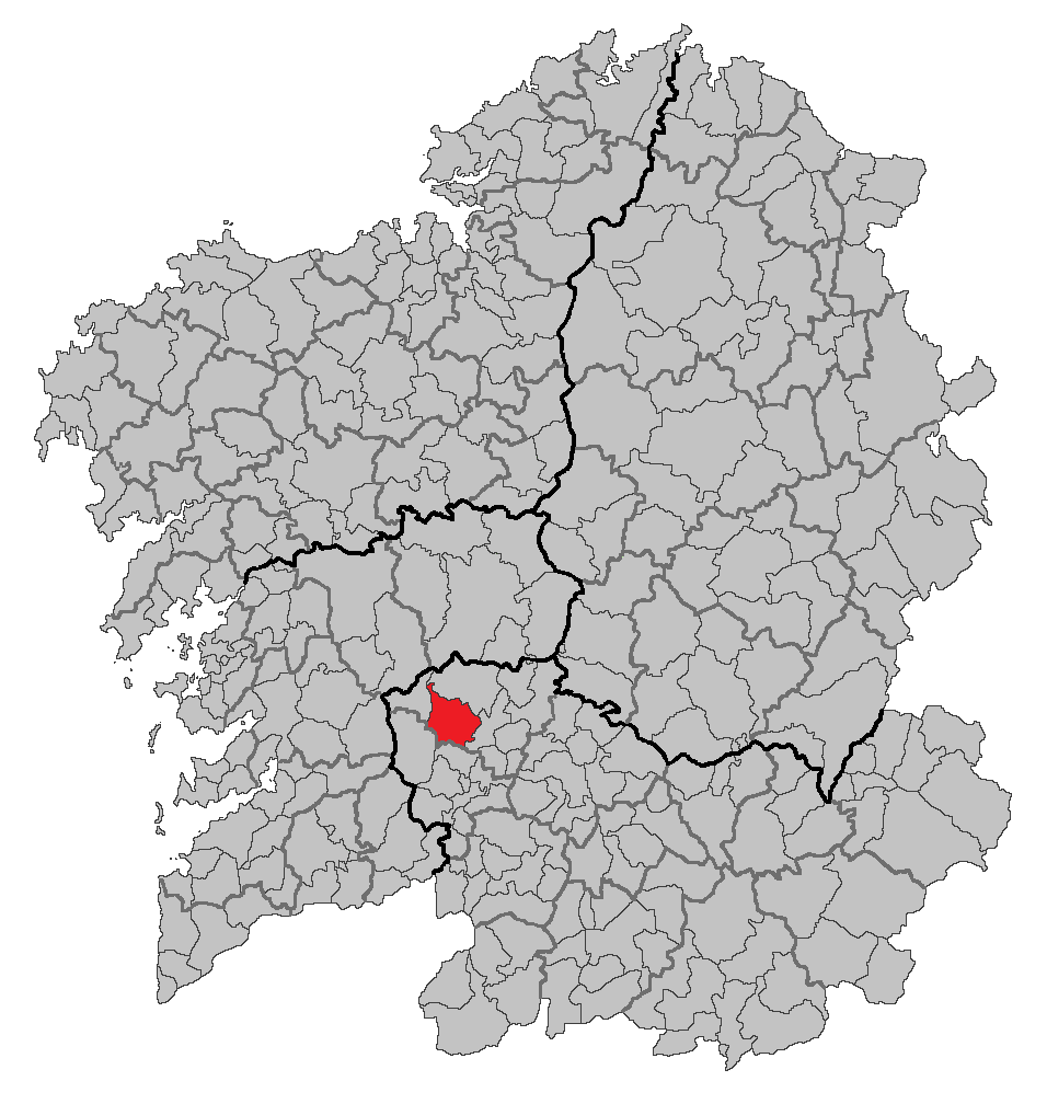 Mapa coa localización do concello de Boborás.